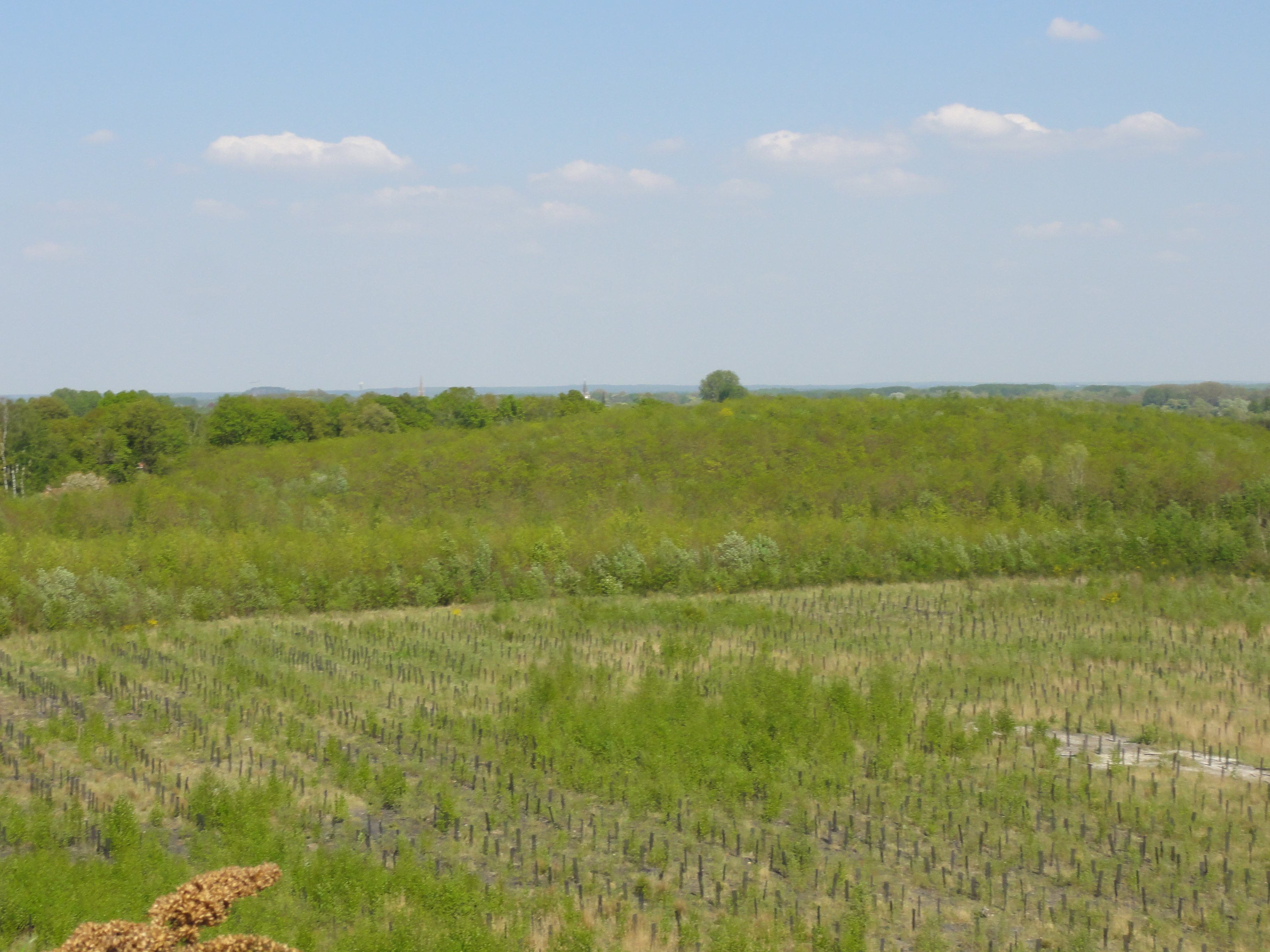 Terril n° 177 dit La Grange Est, Fosse La Grange de la Compagnie des mines d'Anzin, Raismes, Nord, Nord-Pas-de-Calais, France.